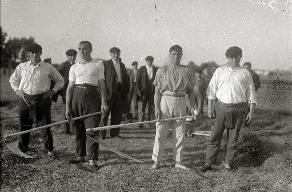 Título original: Competición de segalaris (1/3) Localización: Guipúzcoa